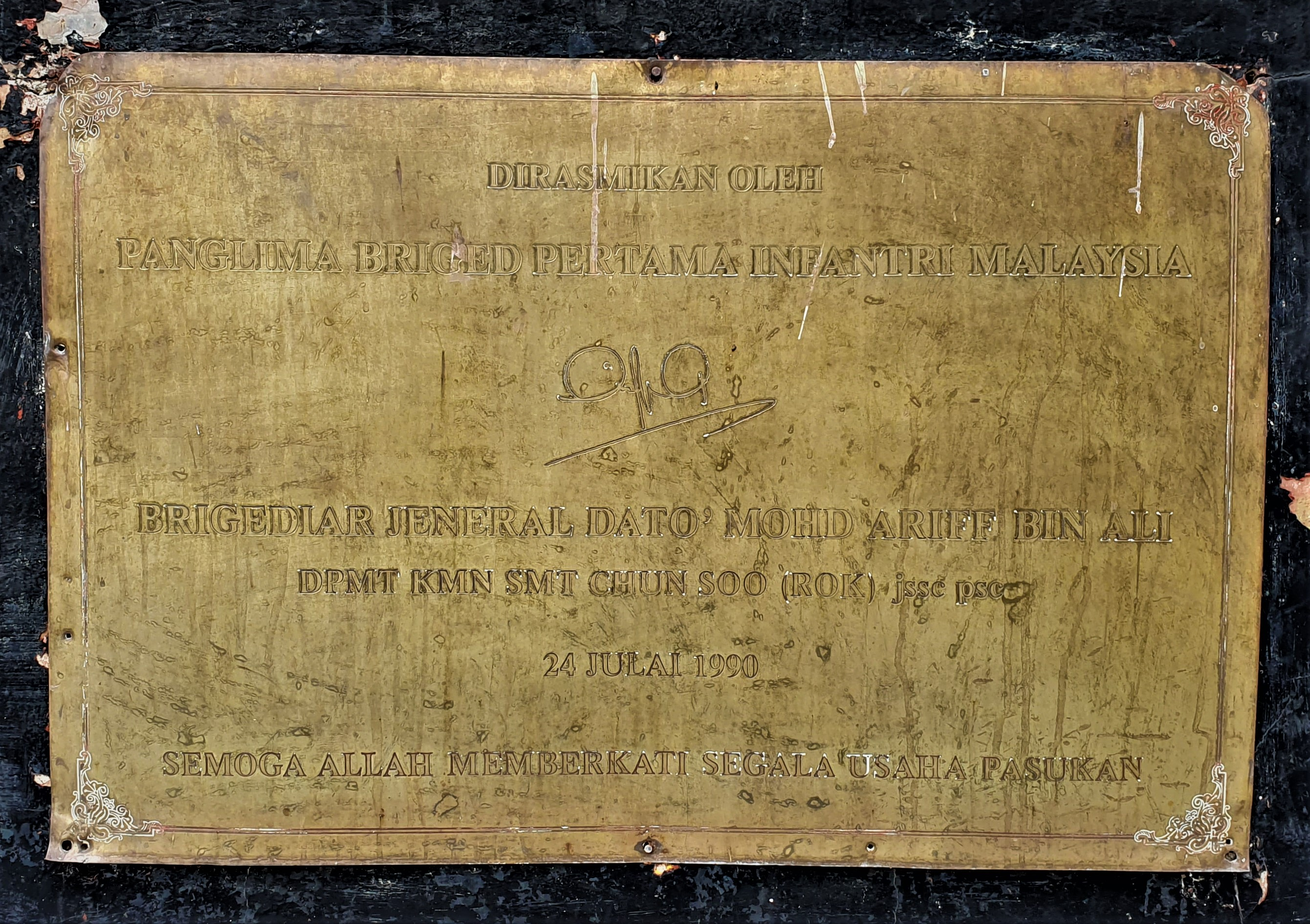 Plat perasmian tugu